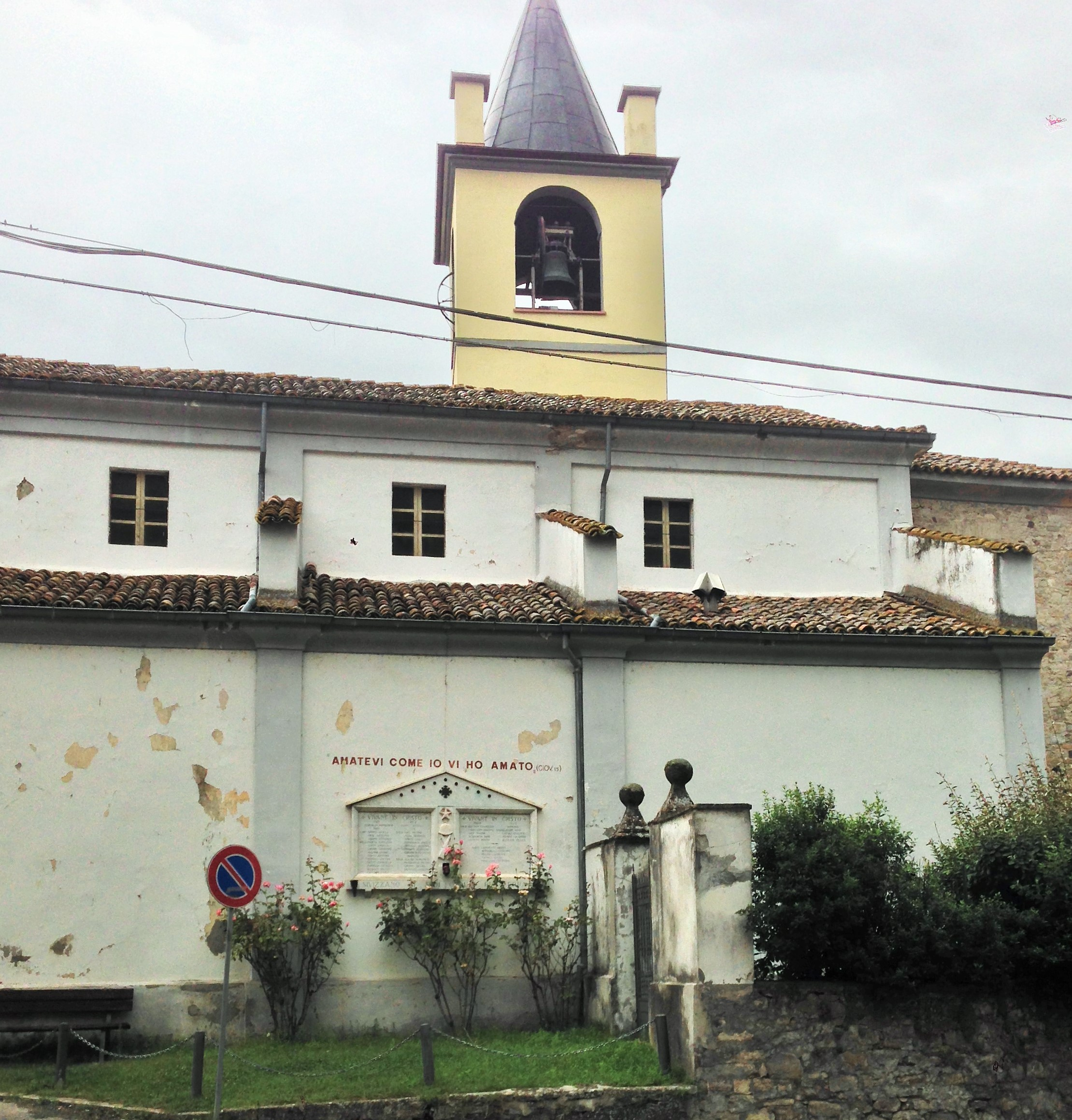 Iglesia entre Fornovo di Taro y Cassio